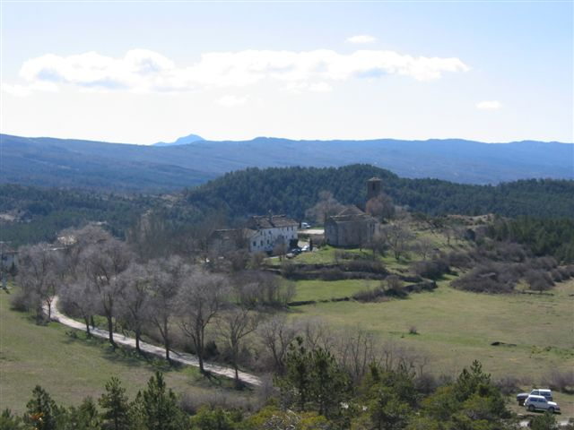 Vista de Aineto desde el depósito de agua